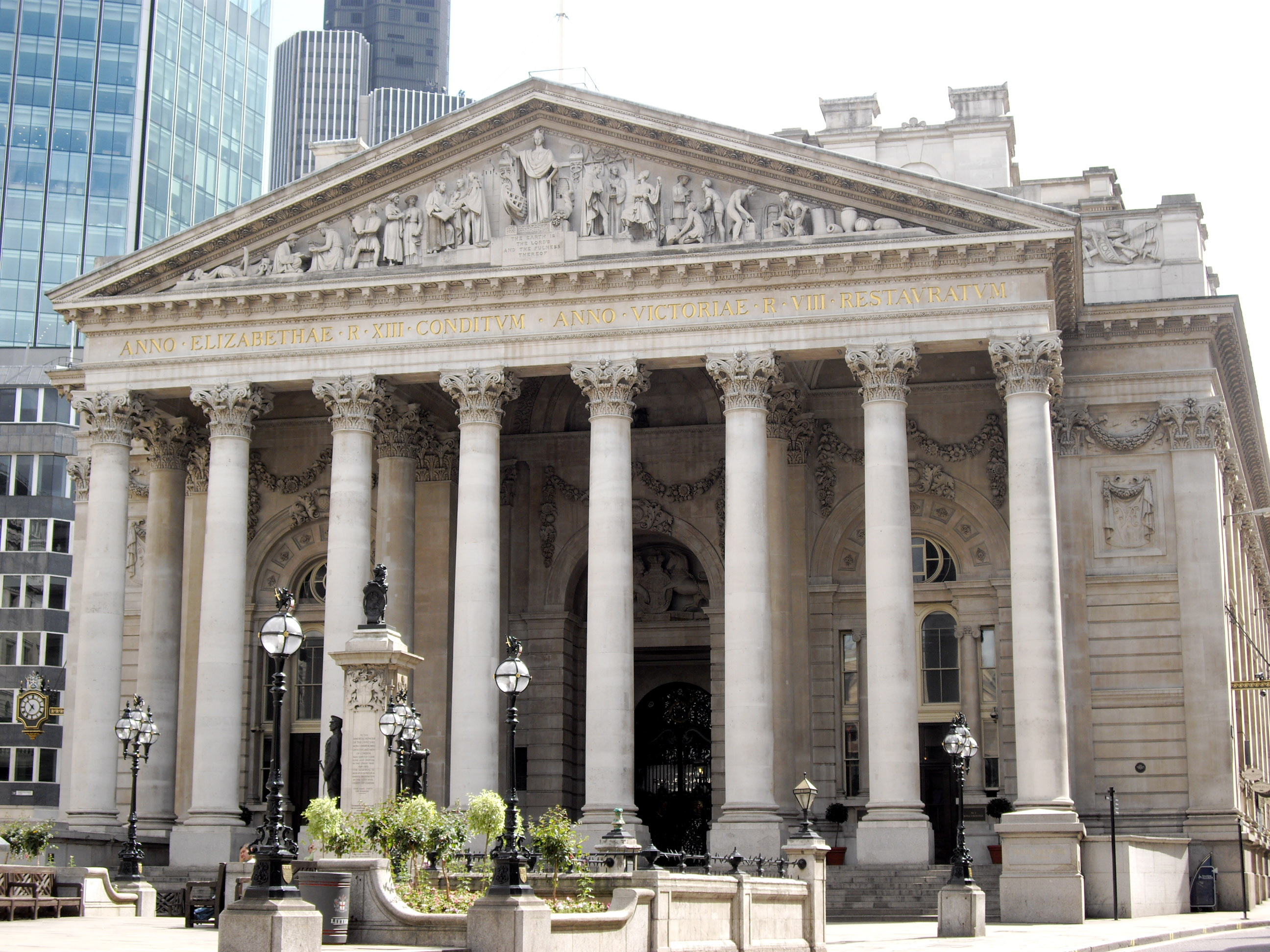 Royal Exchange